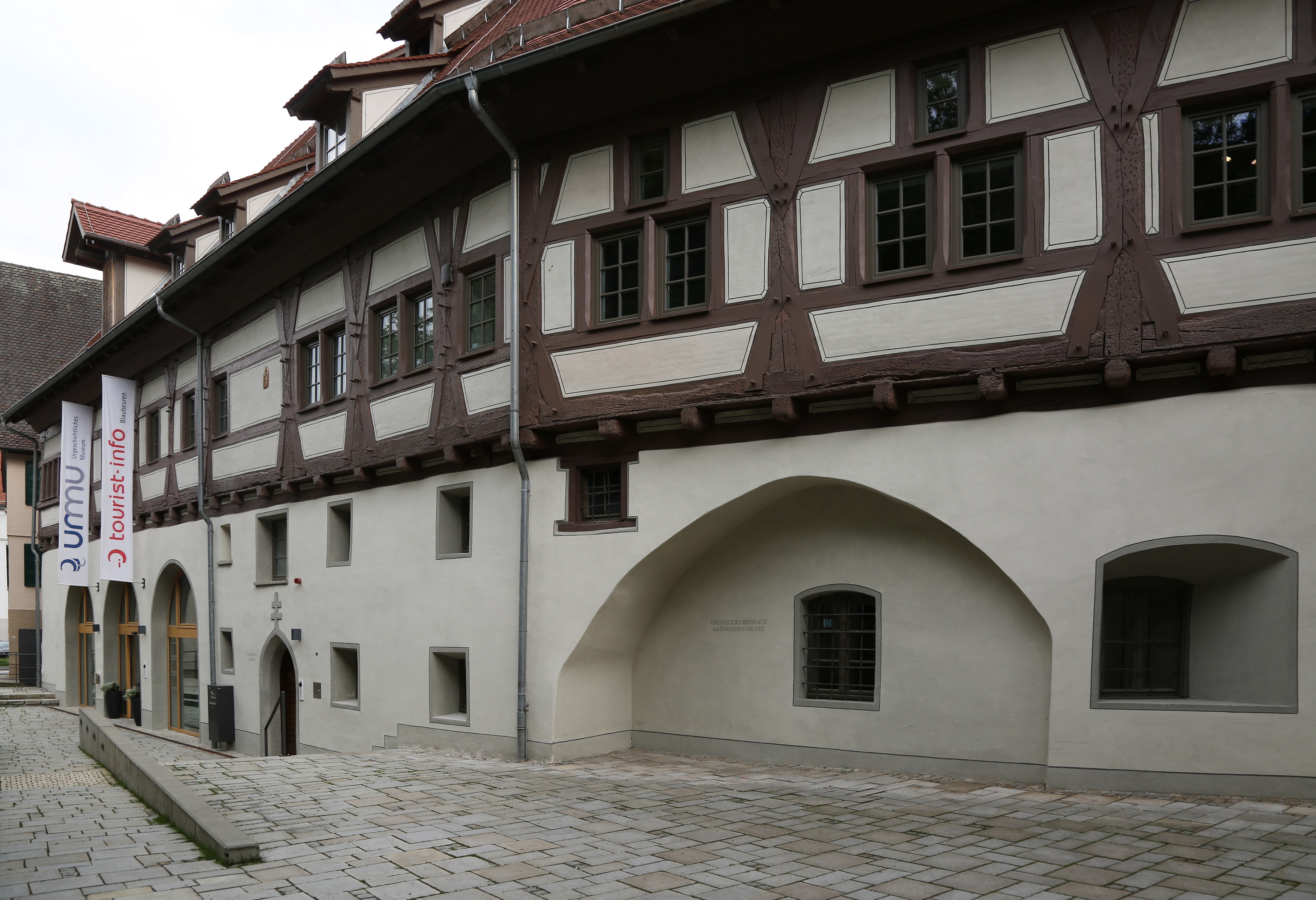 Das Urgeschichtliche Museum in Blaubeuren ist im ehemaligen Spital der Stadt untegebracht.